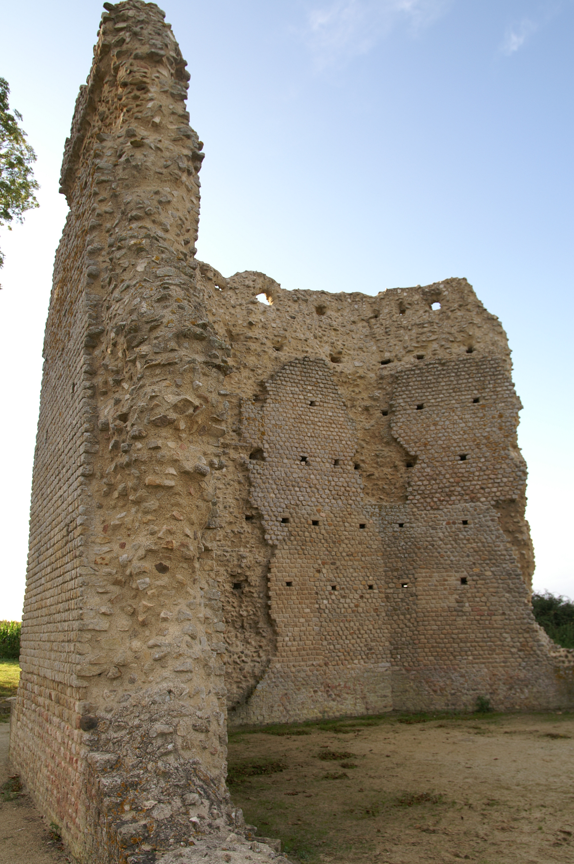 Le temple de Mars à Corseul.